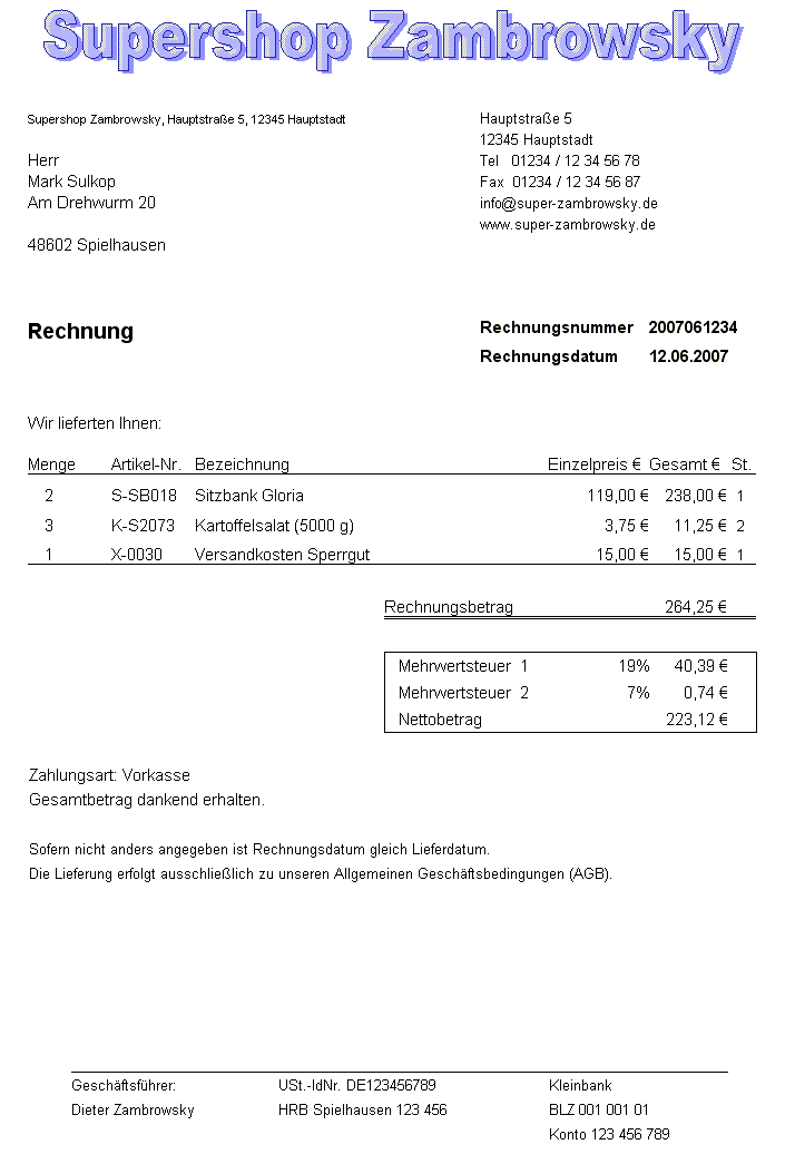 Muster einer Rechnung.